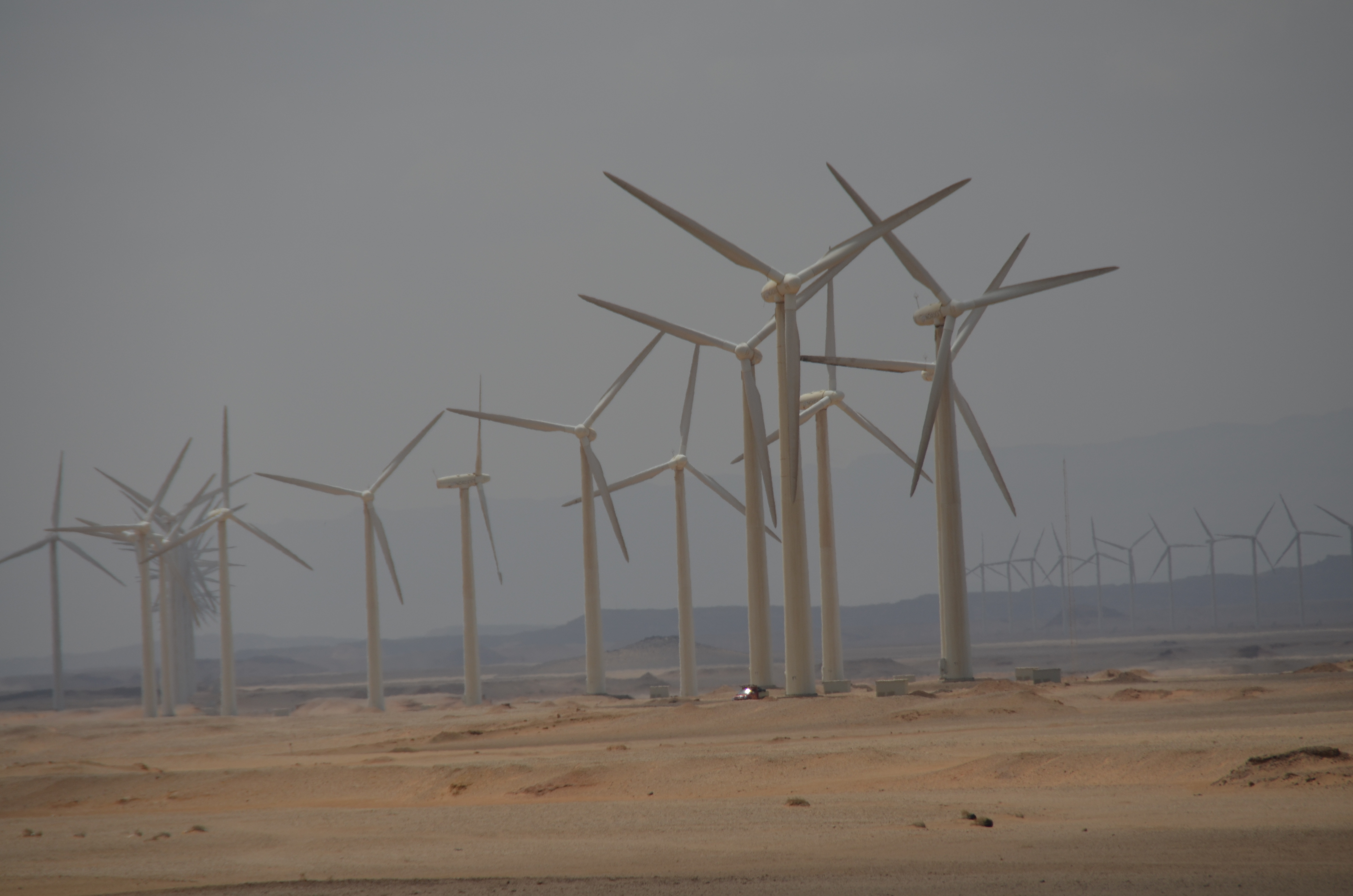 محطة الزعفرانة لتوليد الكهرباء من طاقة الرياح